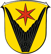 Wappen von Schwalbach_am_Taunus